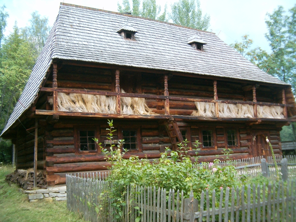 Orawski Park Etnograficzny w Zubrzycy Górnej. Chałupa Paś-Filipka